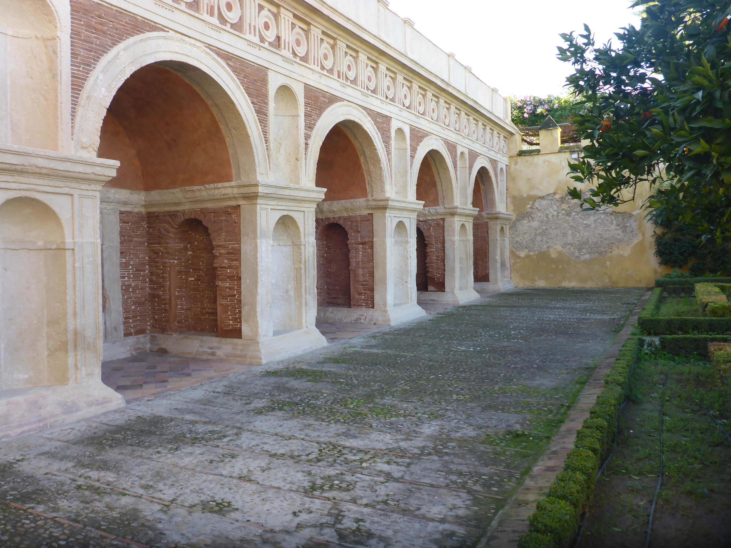 Jardines del Palacio de los Enríquez de Ribera en Bornos (Andalucía, España)